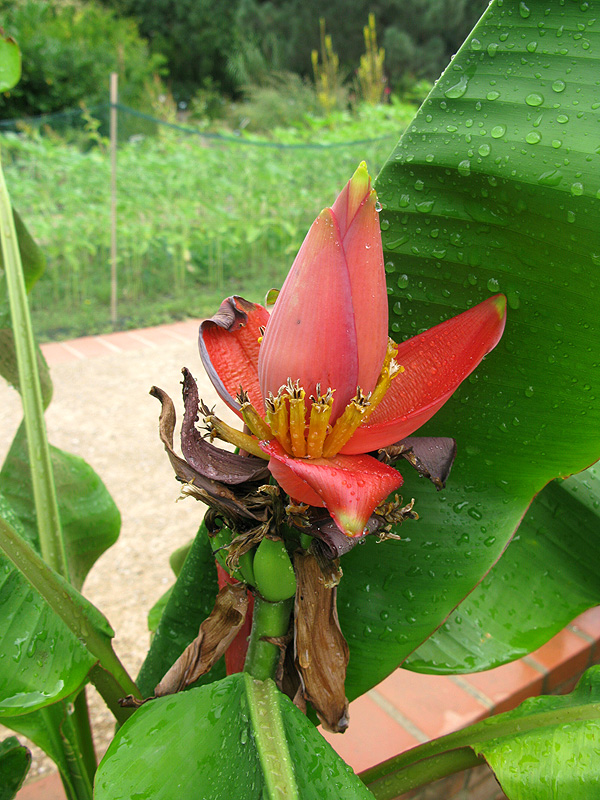 Musa ornata MUSACEAE Bangladesh, Pakistan, Birmanie En fleur en ce moment au Jardin botanique Henri-Gaussen , Muséum d'histoire naturelle de Toulouse (centre ville).